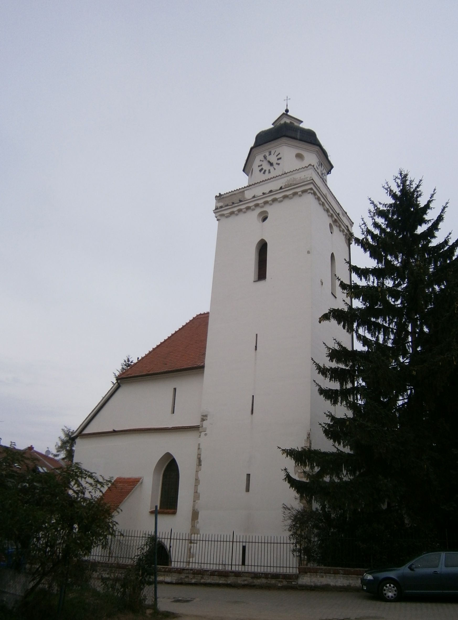 Kostel sv. Jakuba Staršího (Pohořelice), nám. Svobody, Pohořelice